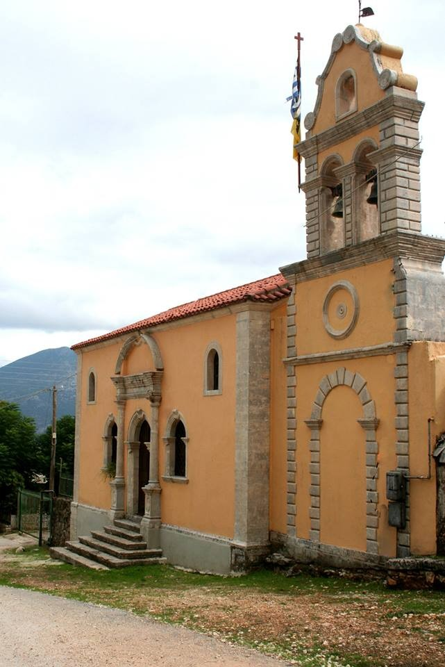 Ι.Ν. Αγίου Σπυρίδωνα